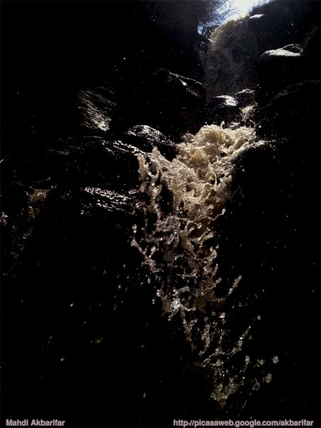 آبشاری واقع در پیله درسی ثمرین